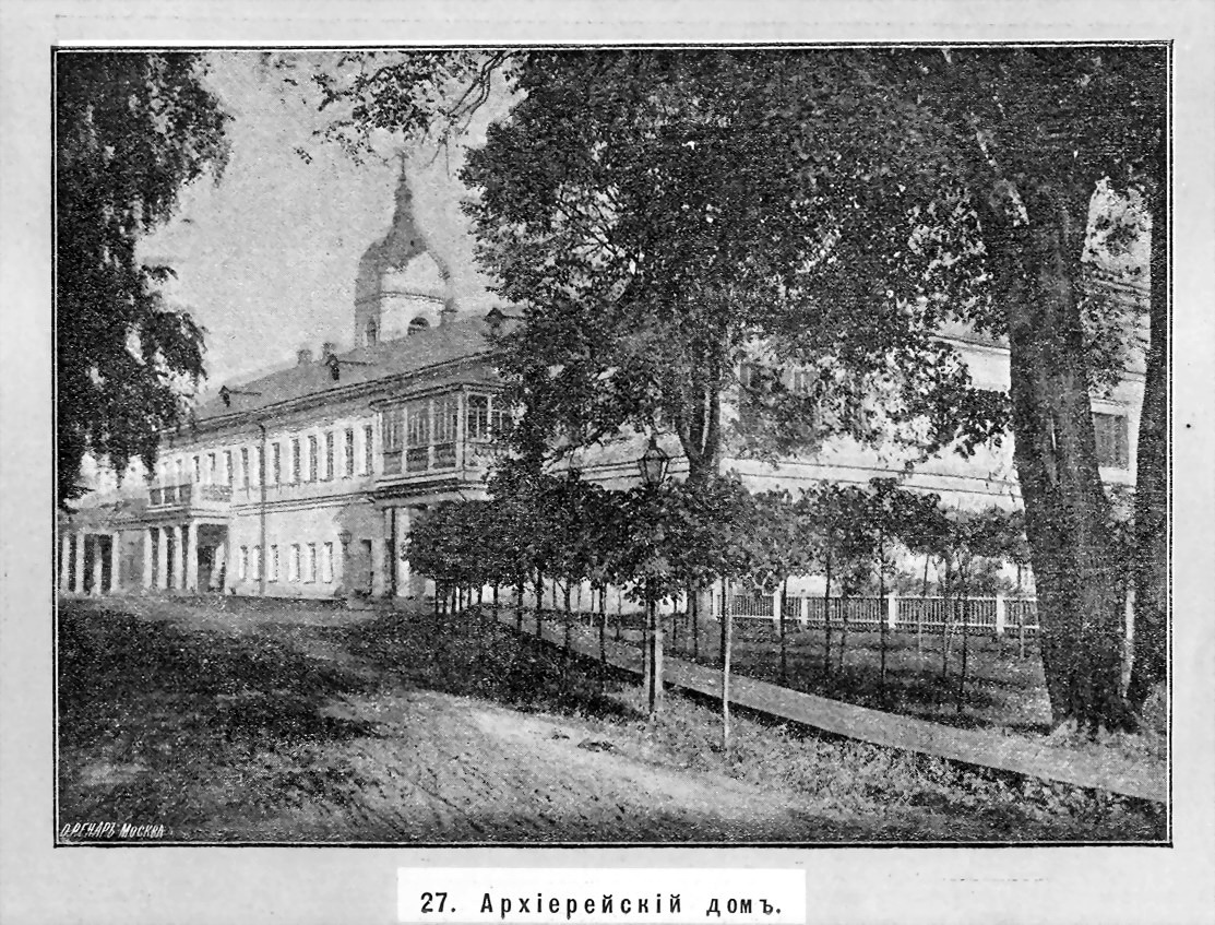 Архиерейский дом (резиденция главы Нижегородской епархии). Ныне — Нижегородская государственная консерватория им. М. И. Глинки